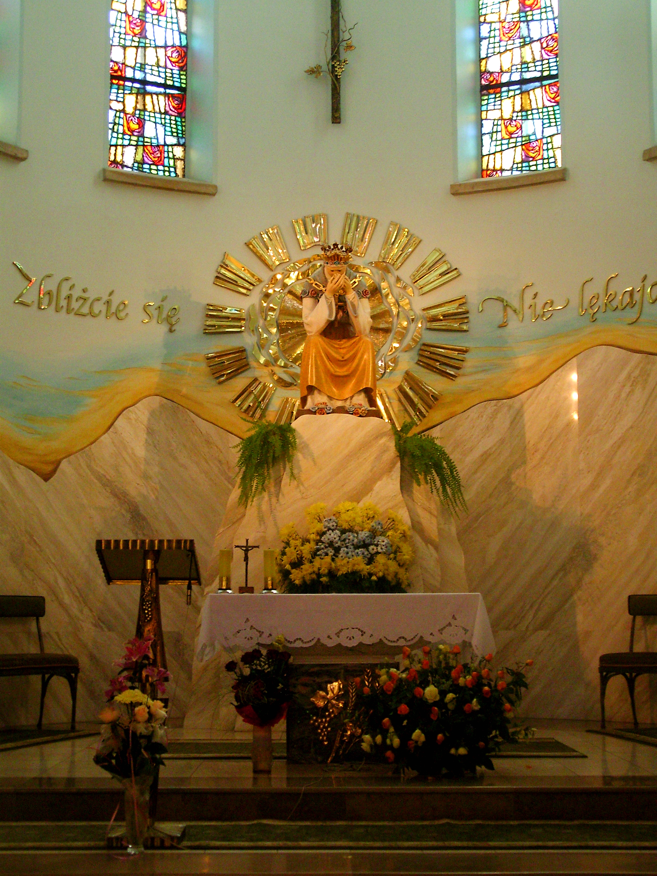 Płacząca Madonna z La Salette w Dębowcu